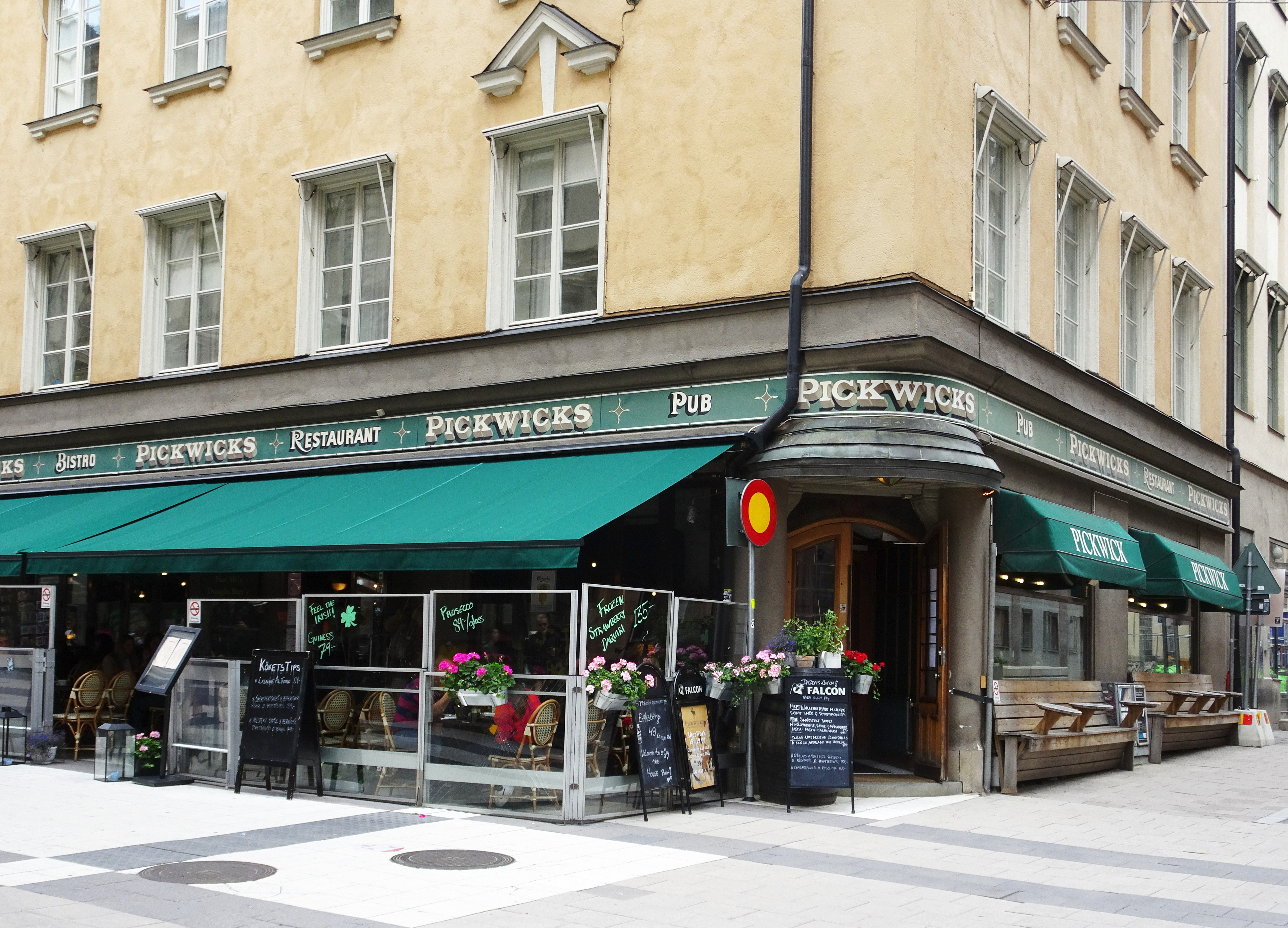 Johannes större 9, Fredsgatan - Drottninggatan, även kallat Sadelmakarens hus (Pickwick Restaurang & Pub)